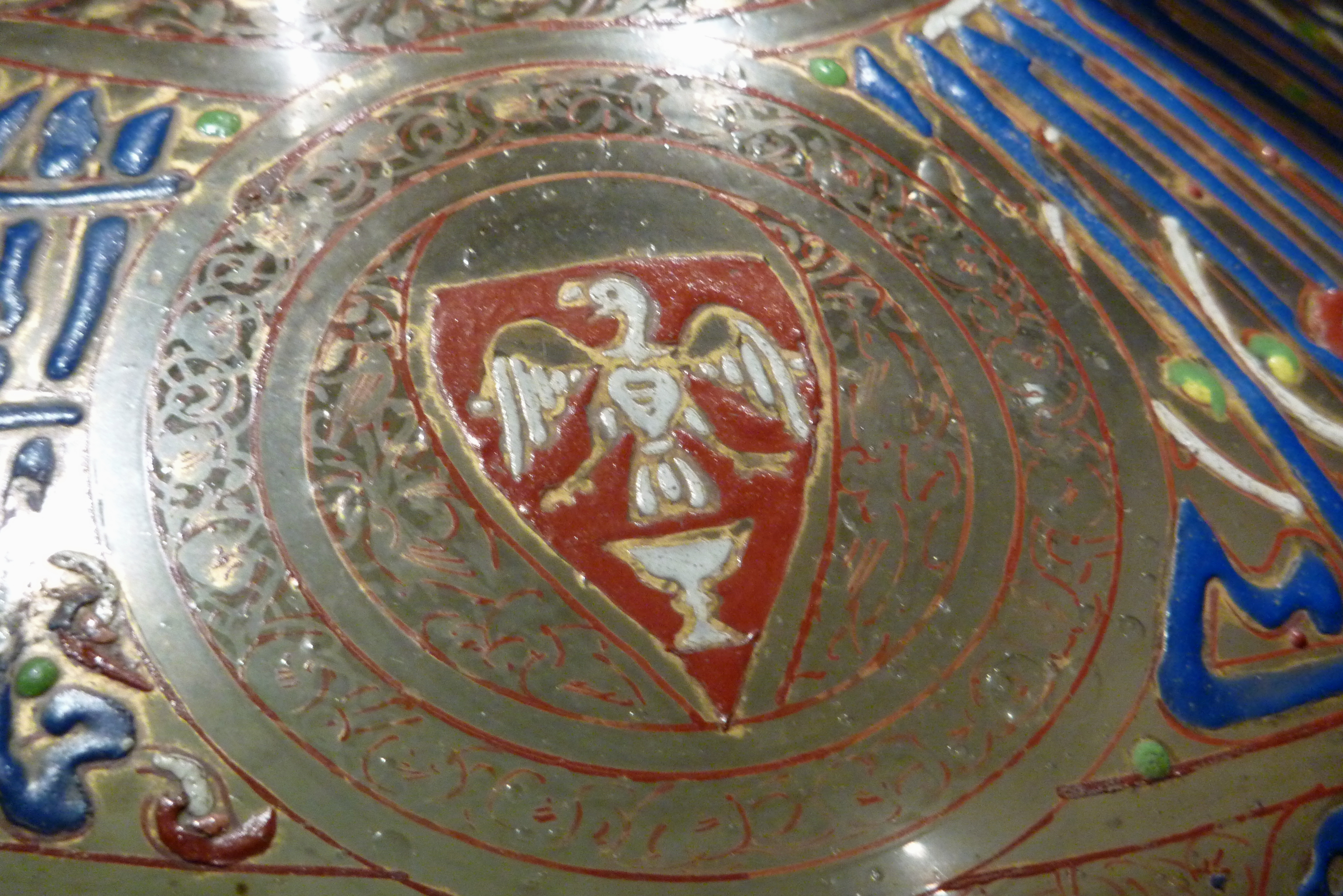 Flasche aus emailliertem und vergoldetem Glas mit Wappen (Ausschnitt) in der Abteilung Islamischer Kunst im Louvre in Paris; aus Syrien oder Ägypten, Mitte des 14. Jahrhunderts, Darstellung: Adler